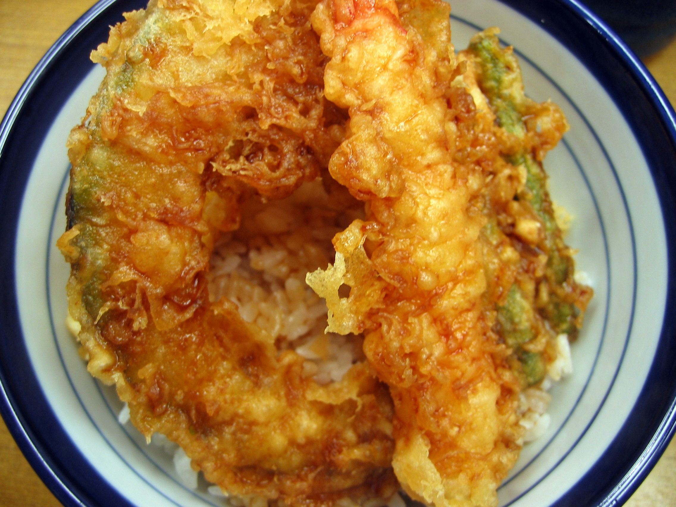 텐돈.IMG_4746